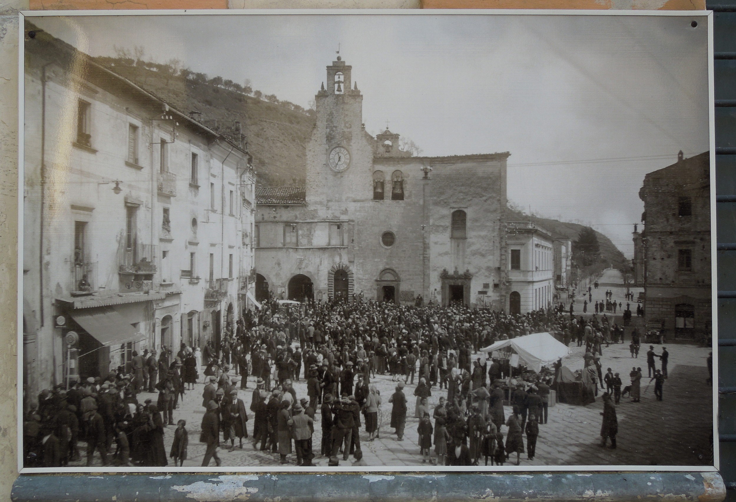 Riproduzione ingrandita di una foto d'epoca della chiesa di San Rocco, esposta per le vie del paesedi Montorio al Vomano in provincia di Teramo.